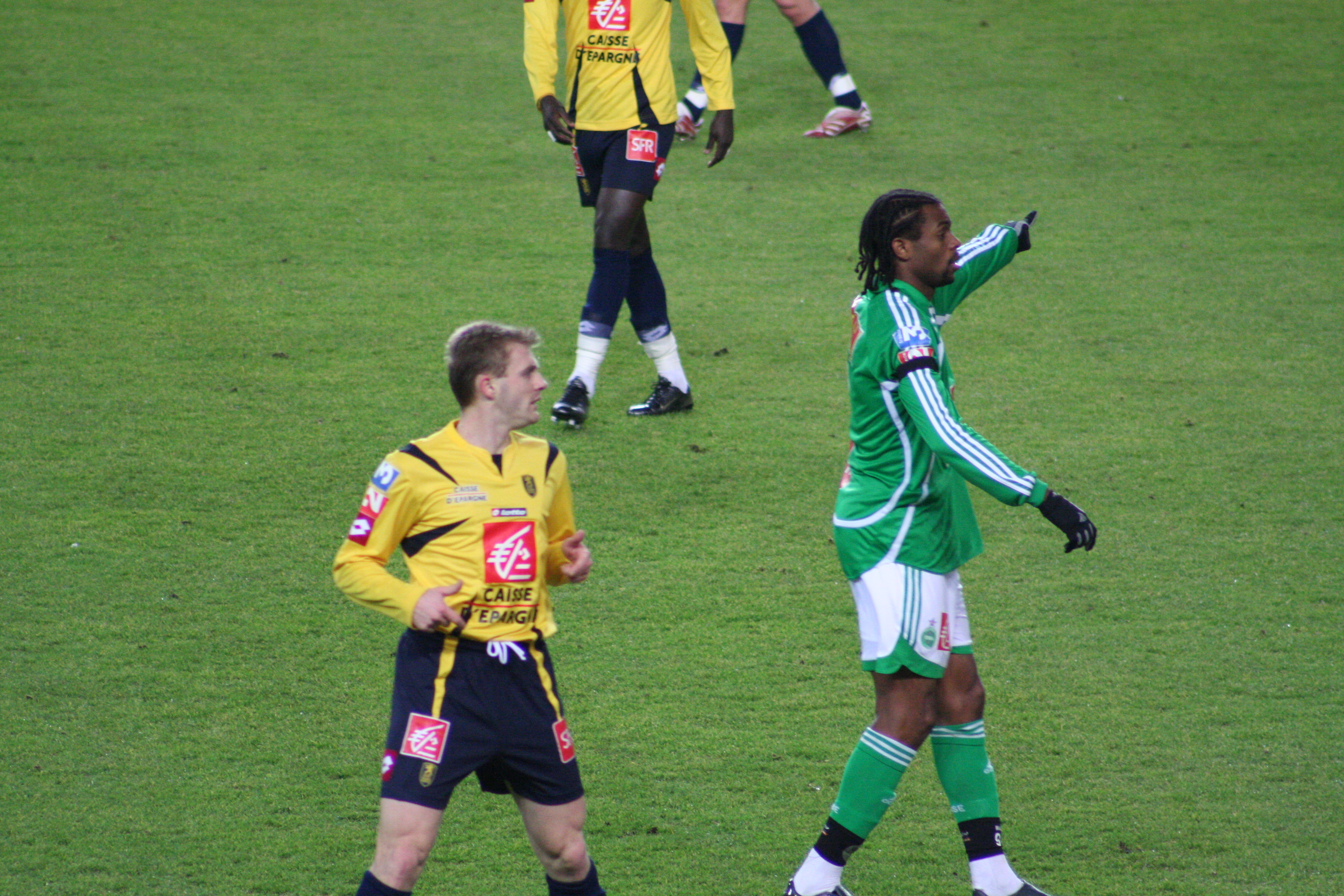 FC Sochaux-AS Saint-Étienne 2006-2007